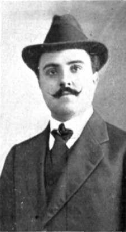 Fotografía del médico y político español José María Albiñana publicada en 1911 con motivo de la celebración de un congreso sobre sanidad civil presidido por él.